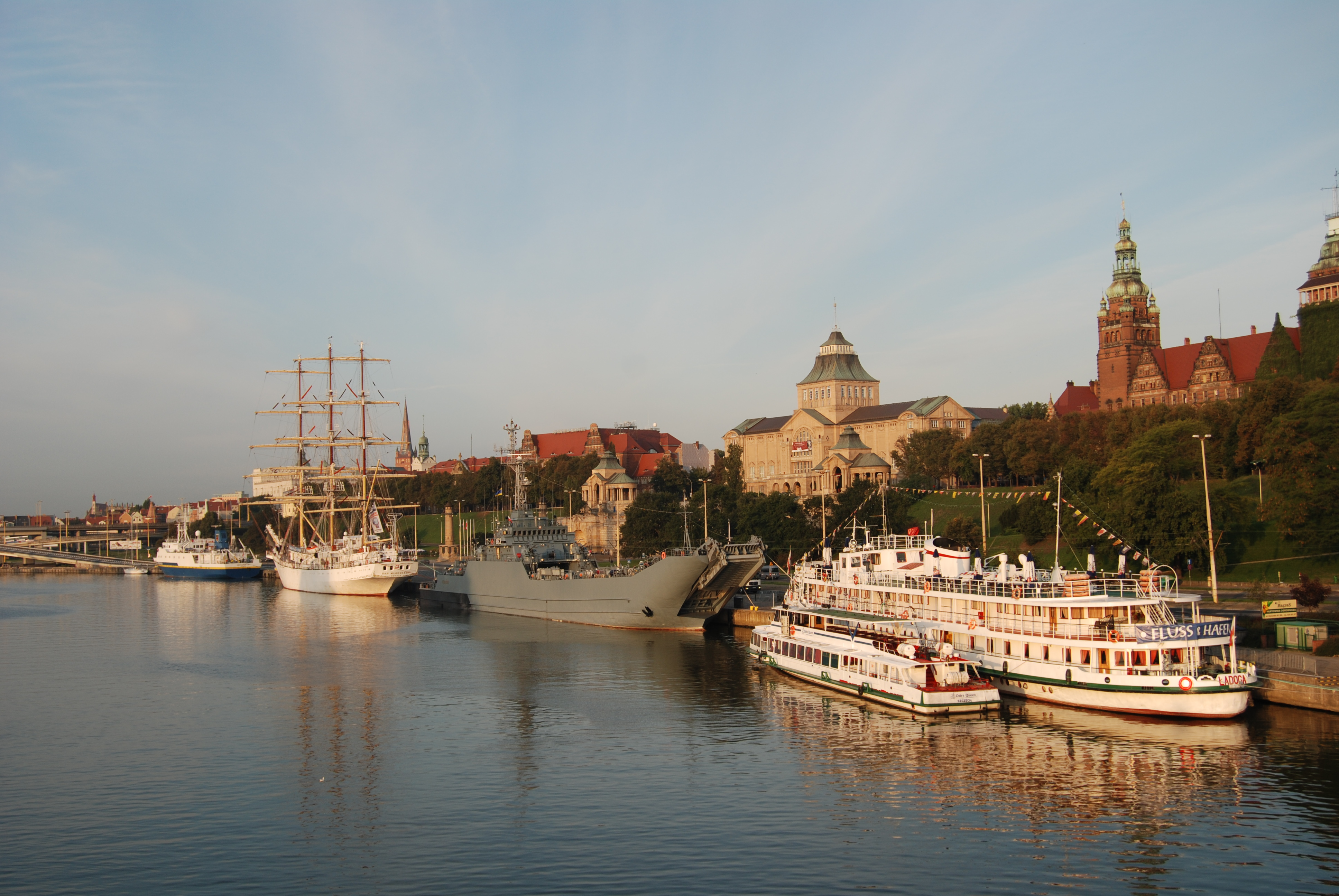 zdjęcie powstało odcumowującego okrętu od Wałów Chrobrego.